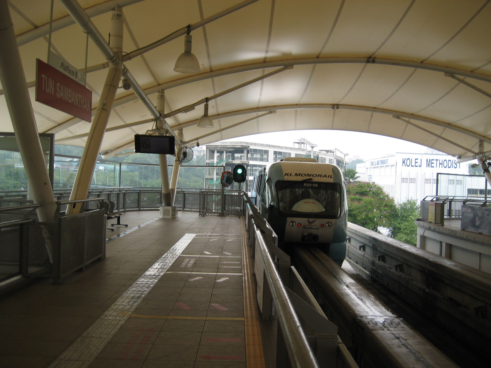 KL Monorail at Tun Sambantan Station